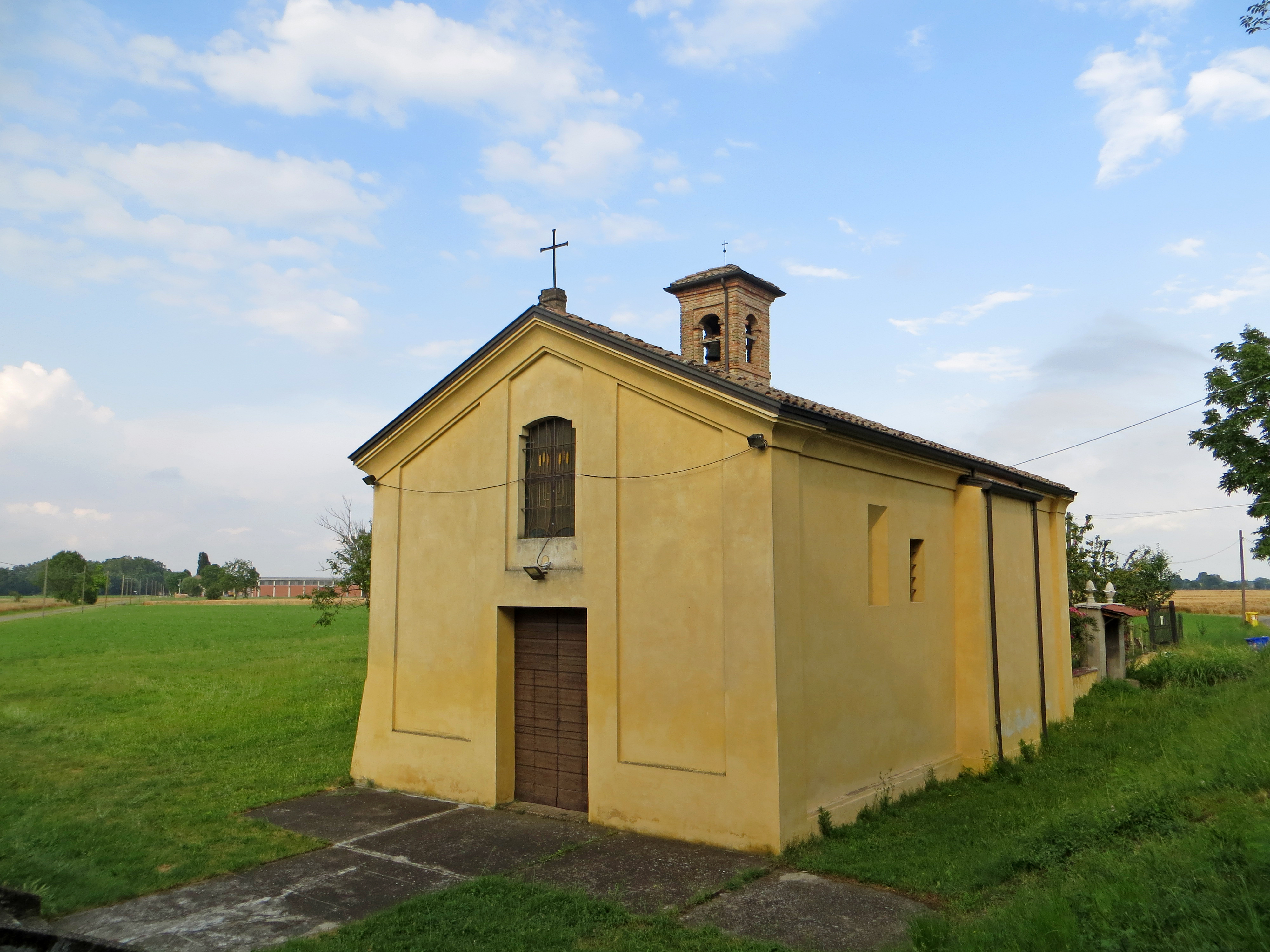 Oratorio di San Lorenzo (San Donato, Parma) - facciata e lato sud